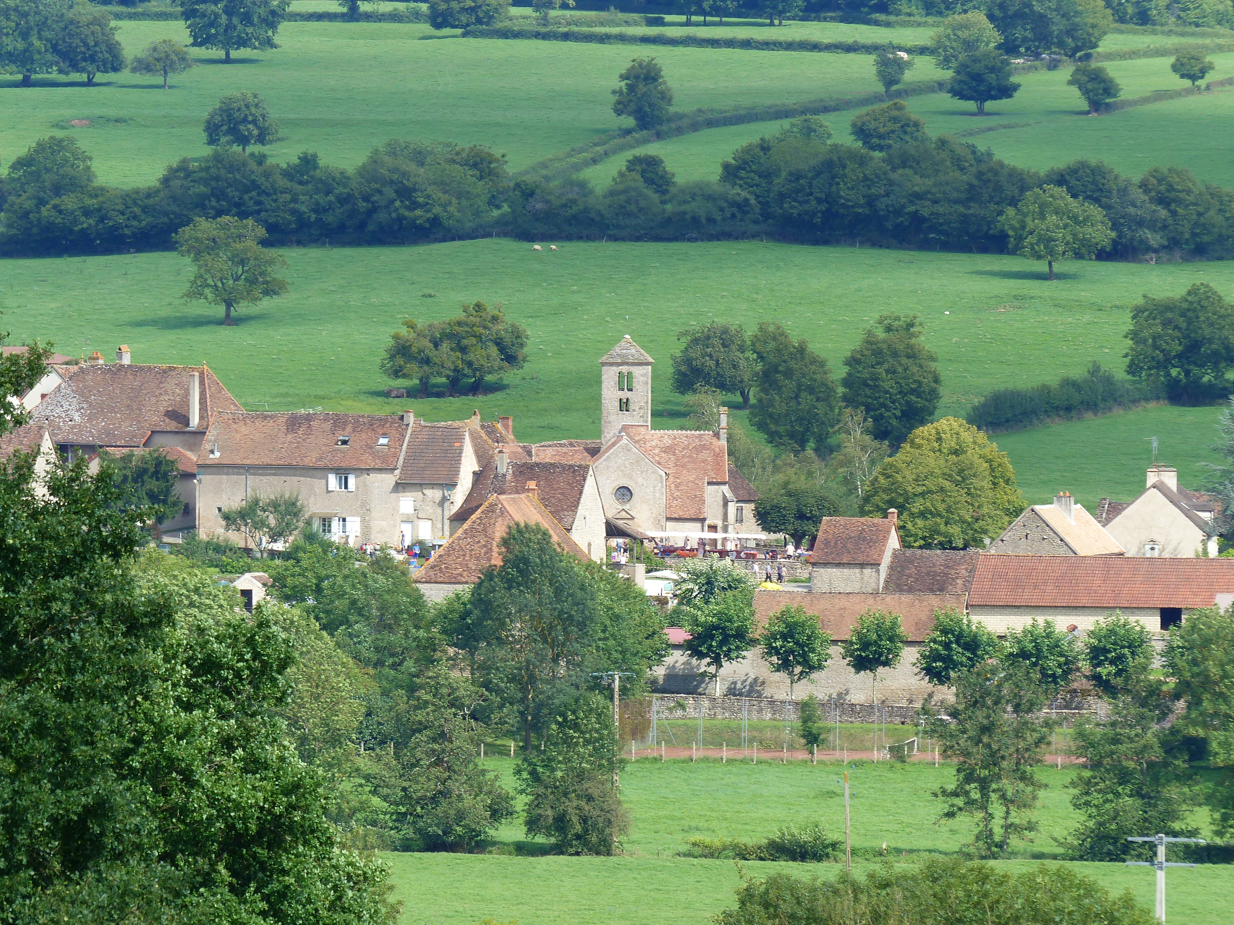 Vue Générale de Saint-Huruge depuis la chapelle Saint-Martin à Saint-Martin-la-Patrouille.